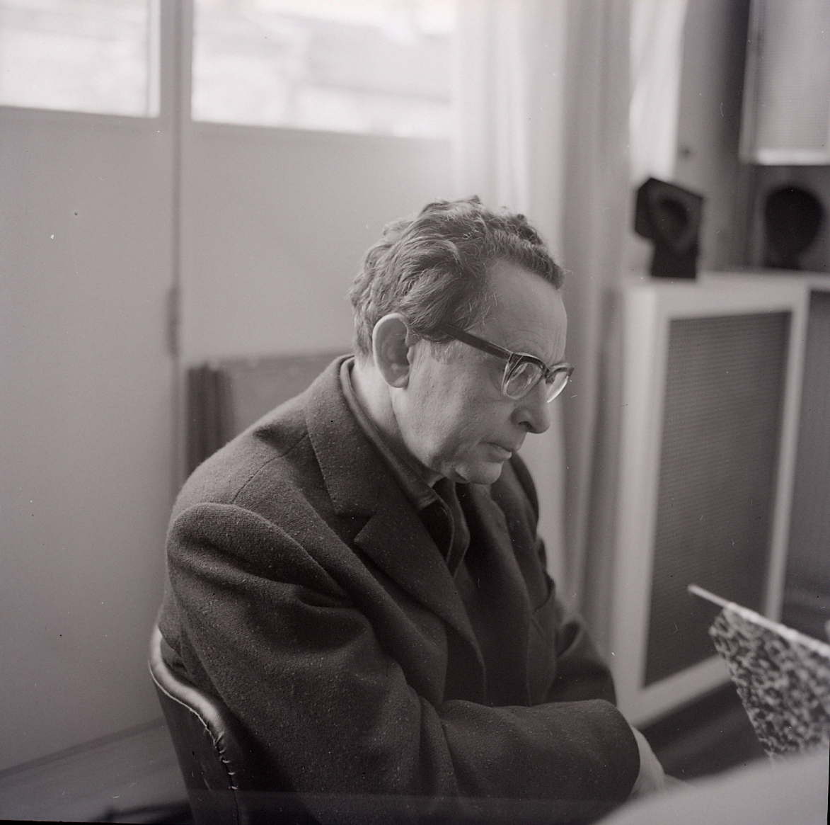 Servizio fotografico : Italia, 1965 / Paolo Monti. - Buste: 17, Fototipi: 17 : Negativo b/n, gelatina bromuro d'argento/ pellicola ; 6x6. - ((Serie costituita da 17 negativi identificati con i nn.: R14276-14292. Sulla busta del negativo R14276 manoscritto: "Hartung". La suddetta serie è contenuta nella scatola identificata con la numerazione R14207/R14356. Sul coperchio della scatola, manoscritto a pennarello: "Ritratti".